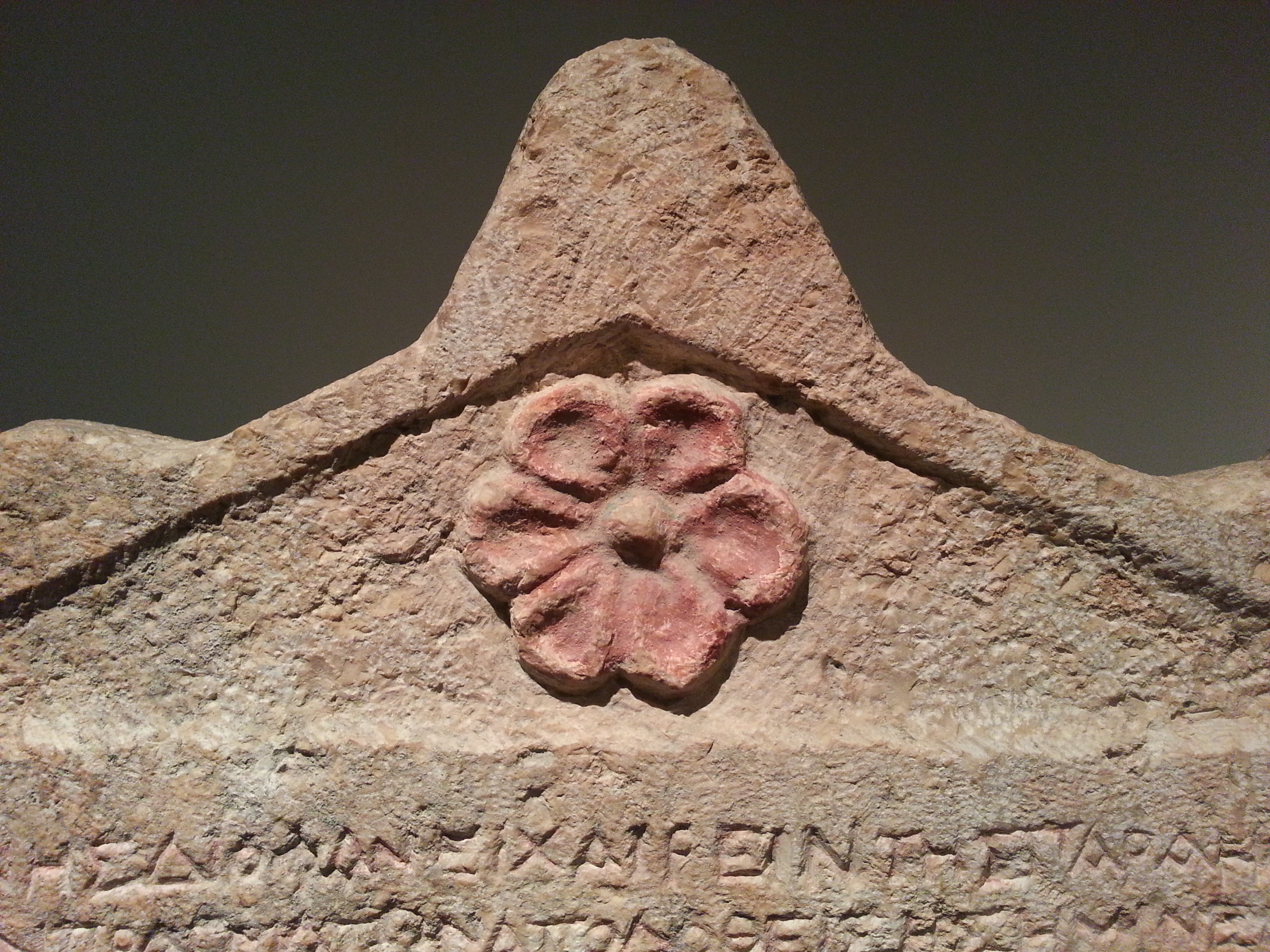 כתובת הליודורוס במוזיאון ישראל בירושלים